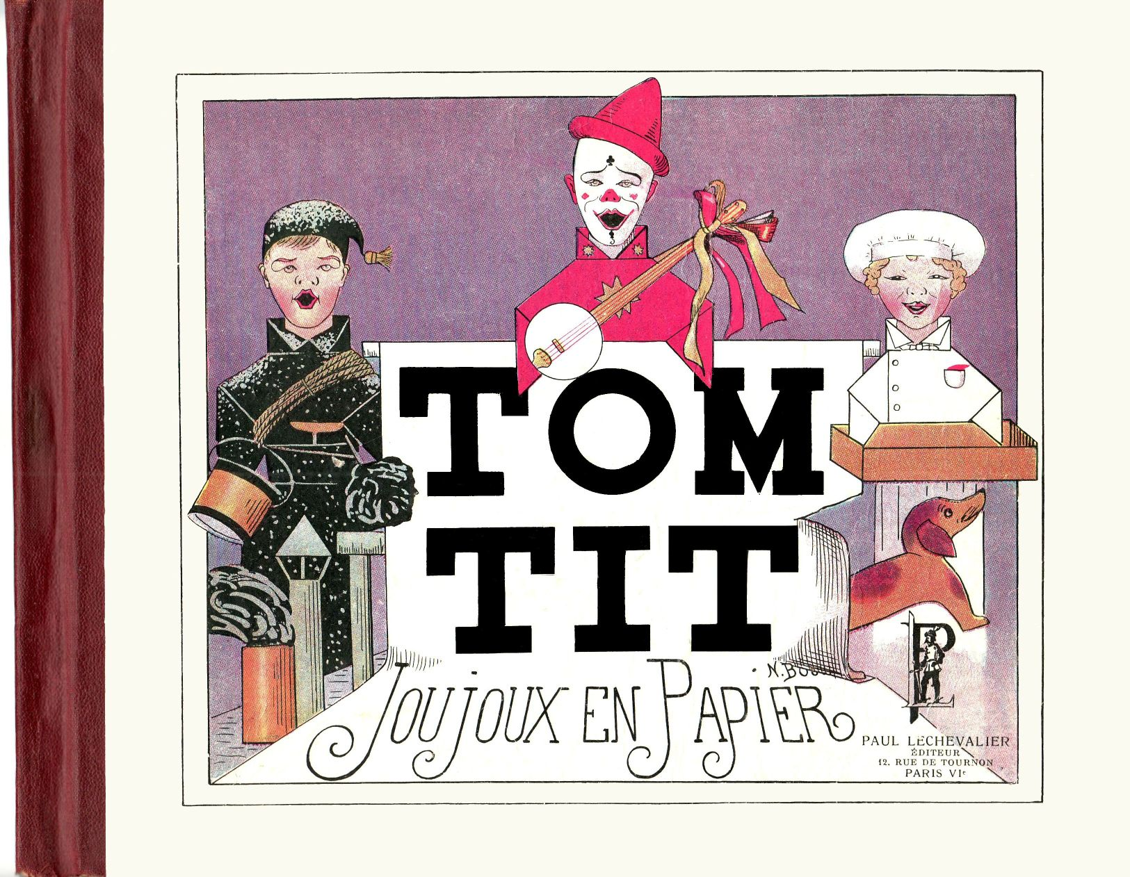 Couverture livre de Tom Tit : Joujoux en Papier